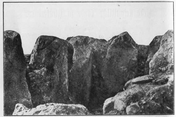 Ansicht des Großsteingrabes Cramon